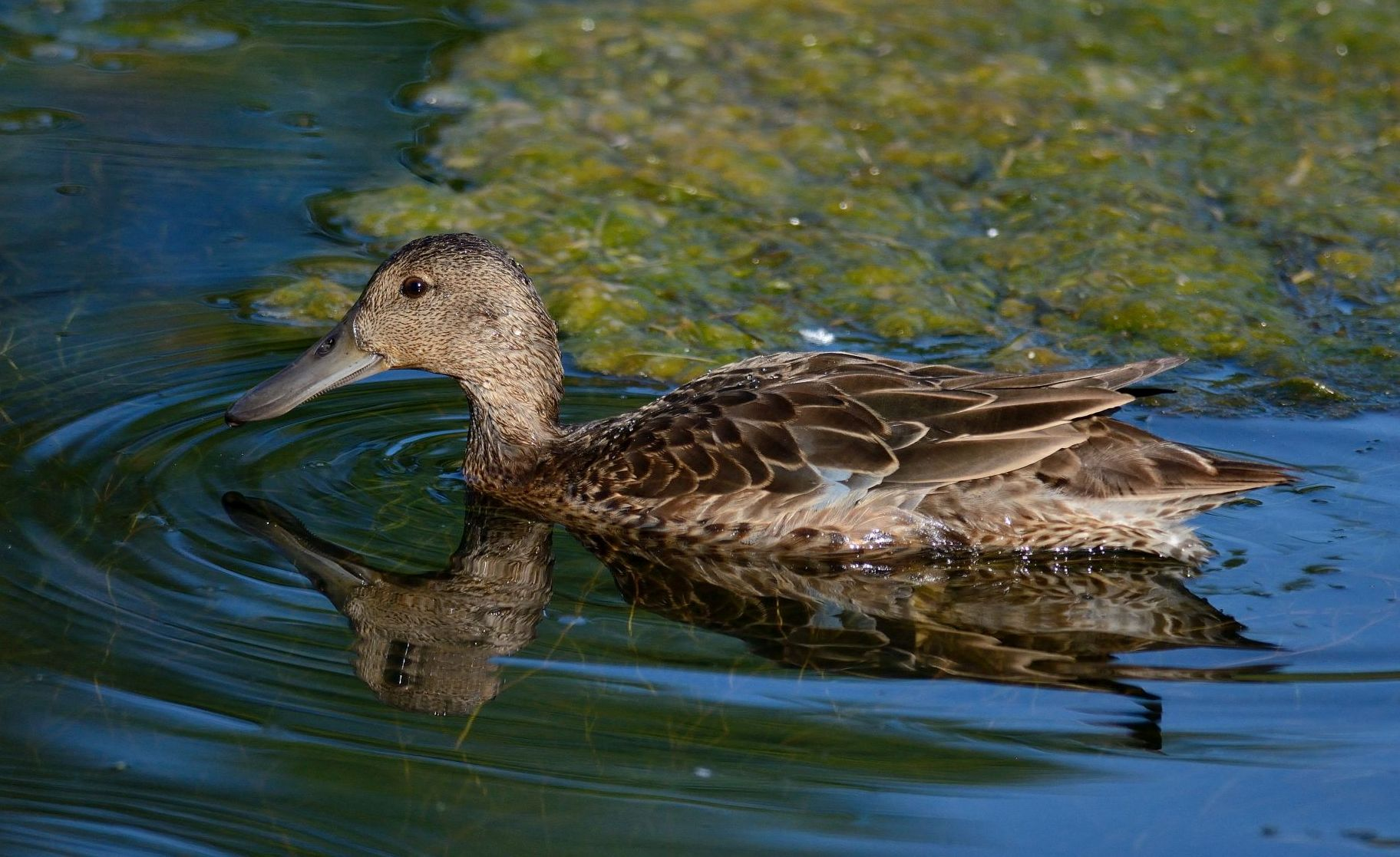 Pato Colorado Hembra, Humedal San Andrés